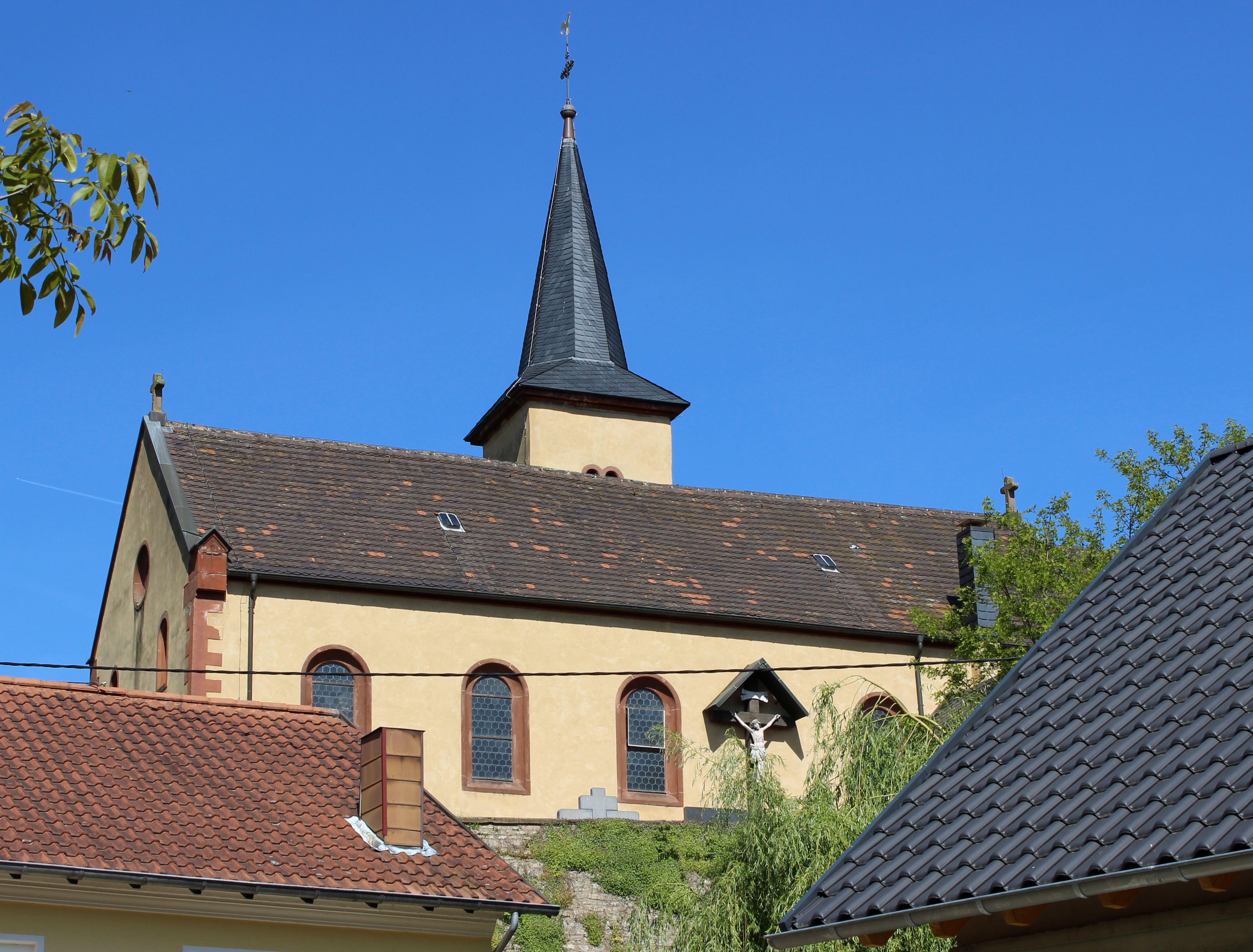 Die katholische Pfarrkirche St. Hubertus in Ihn, einem Ortsteil der Gemeinde Wallerfangen, Landkreis Saarlouis, Saarland